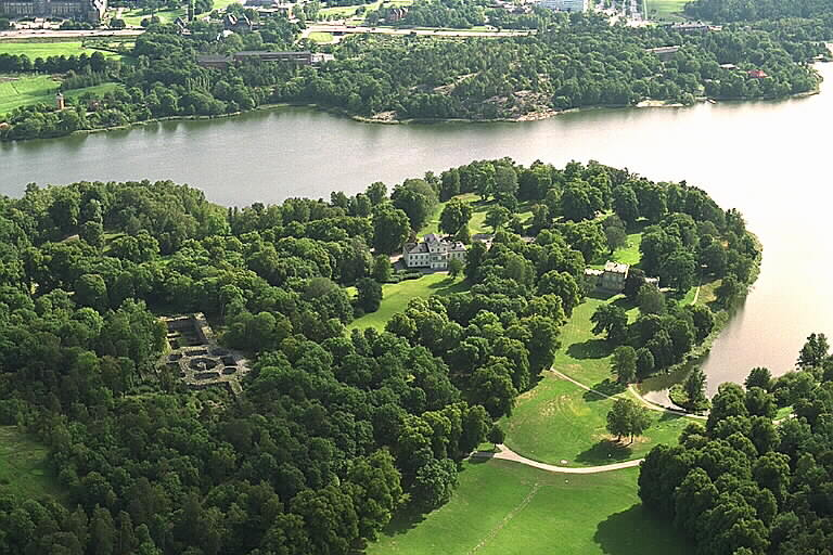 Haga slott Motiv: Haga Nyckelord: Byggnadsminnen:Statl, Flygbilder, Riksintressen Kategori: Herrgårds-/slottslandskap Haga slott.